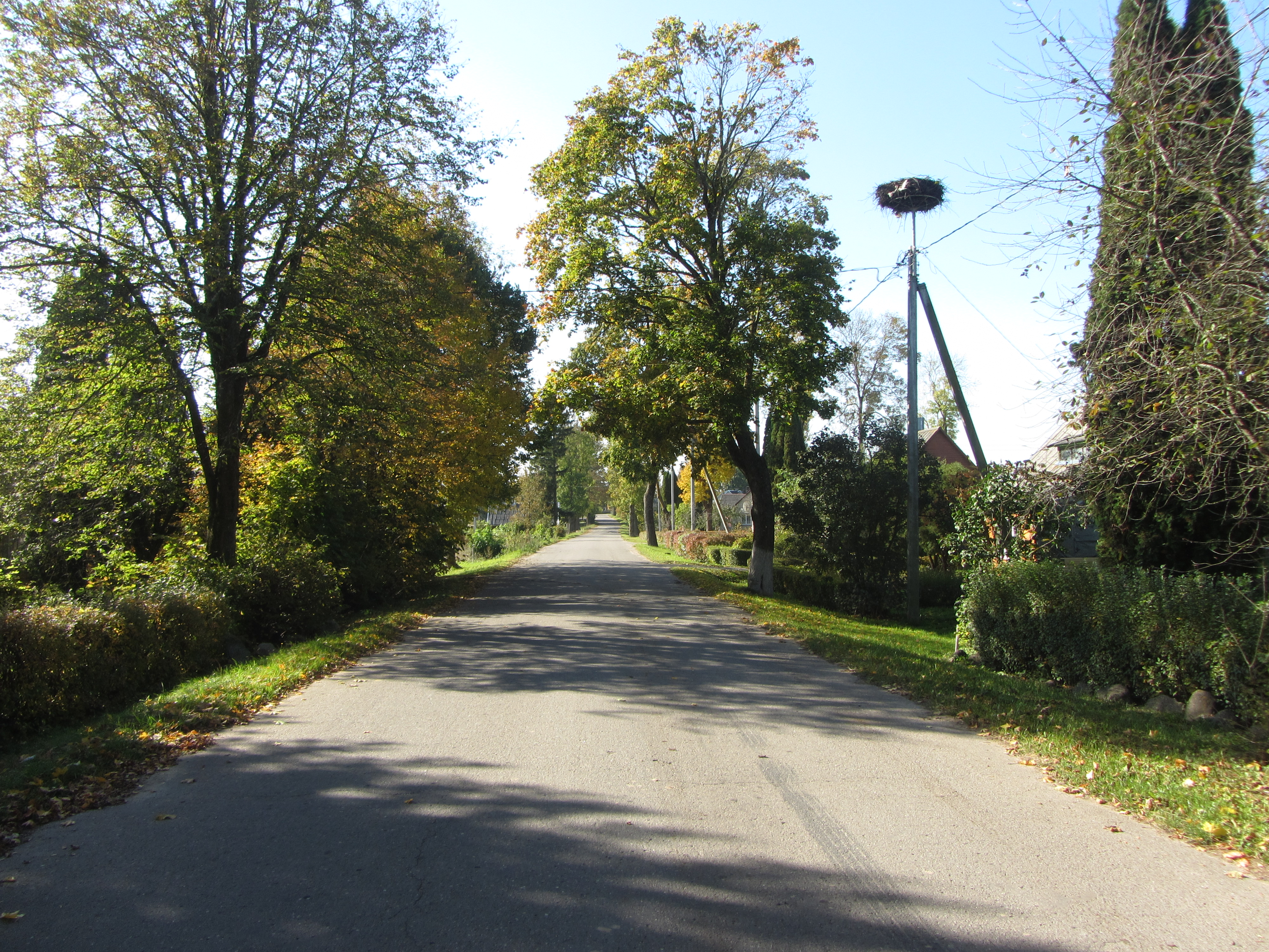 Maineivos, Lithuania